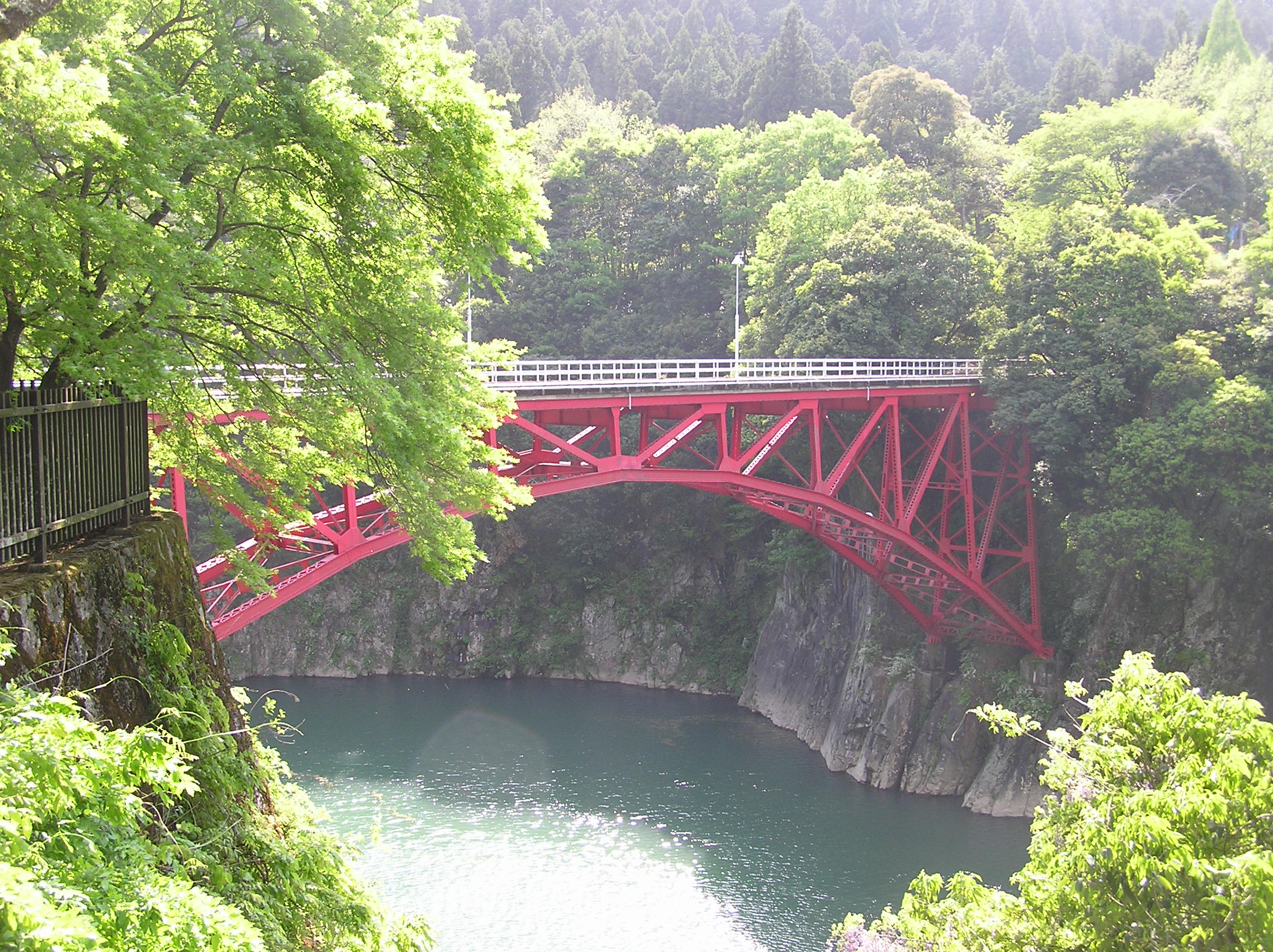 蘇水峡橋（岐阜県加茂郡八百津町）